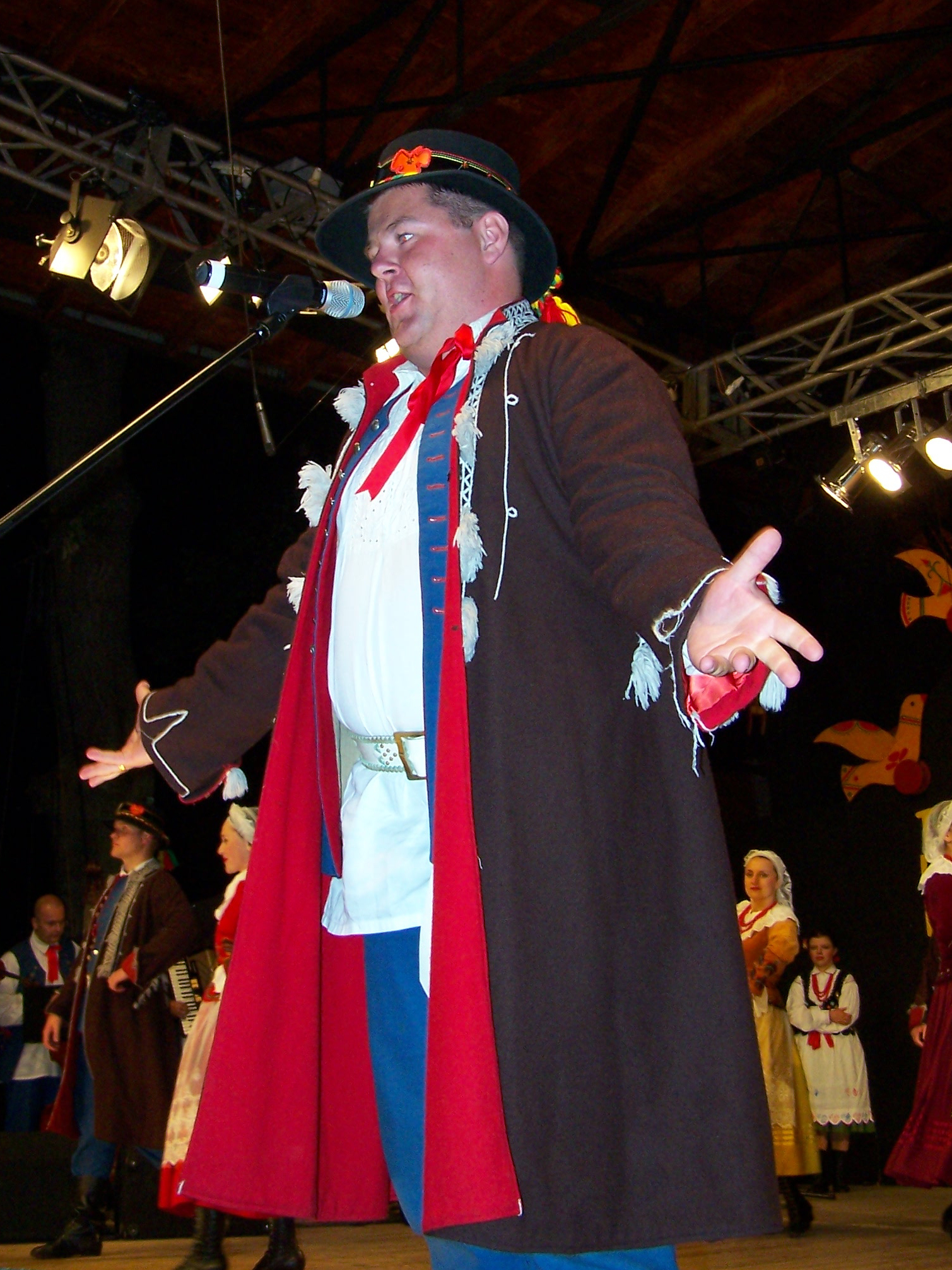 Występ zespołu Połoniny z Rzeszowa podczas 43. Tygodnia Kultury Beskidzkiej w Żywcu.